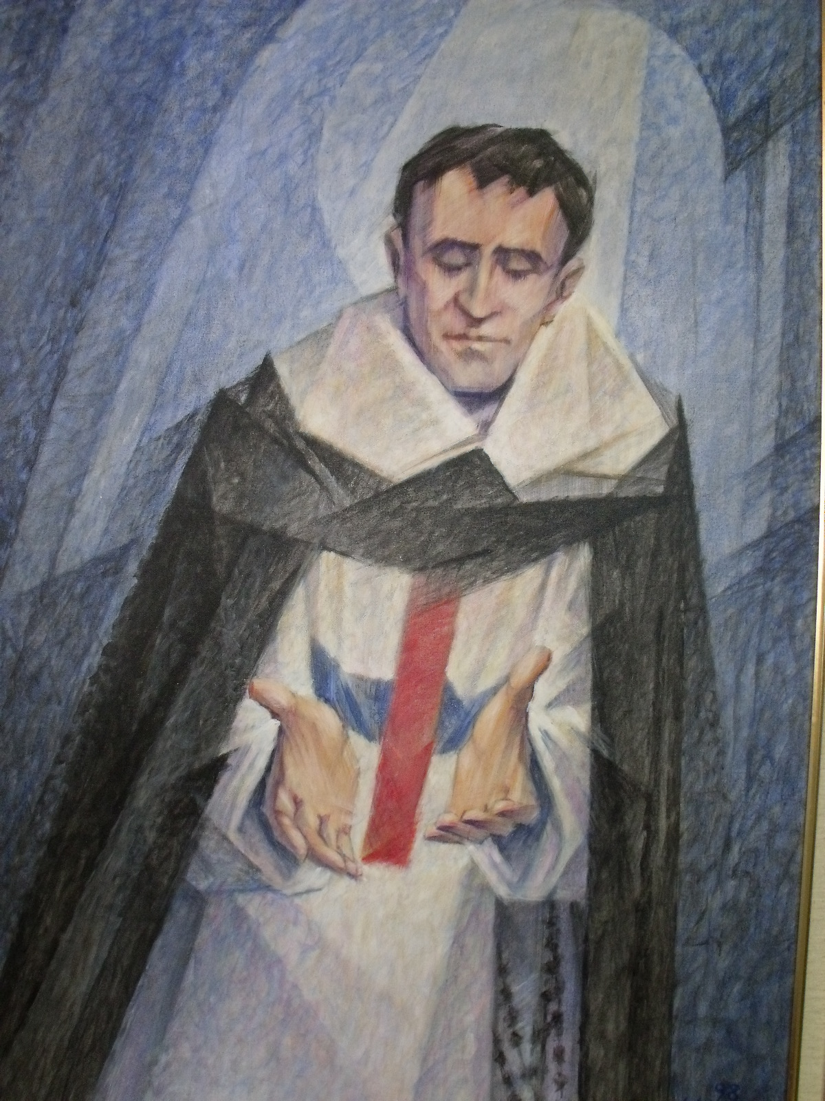 Venerable Félix de la Virgen, religioso trinitario. Lienzo en la iglesia de los trinitarios de Ponce - Puerto Rico.